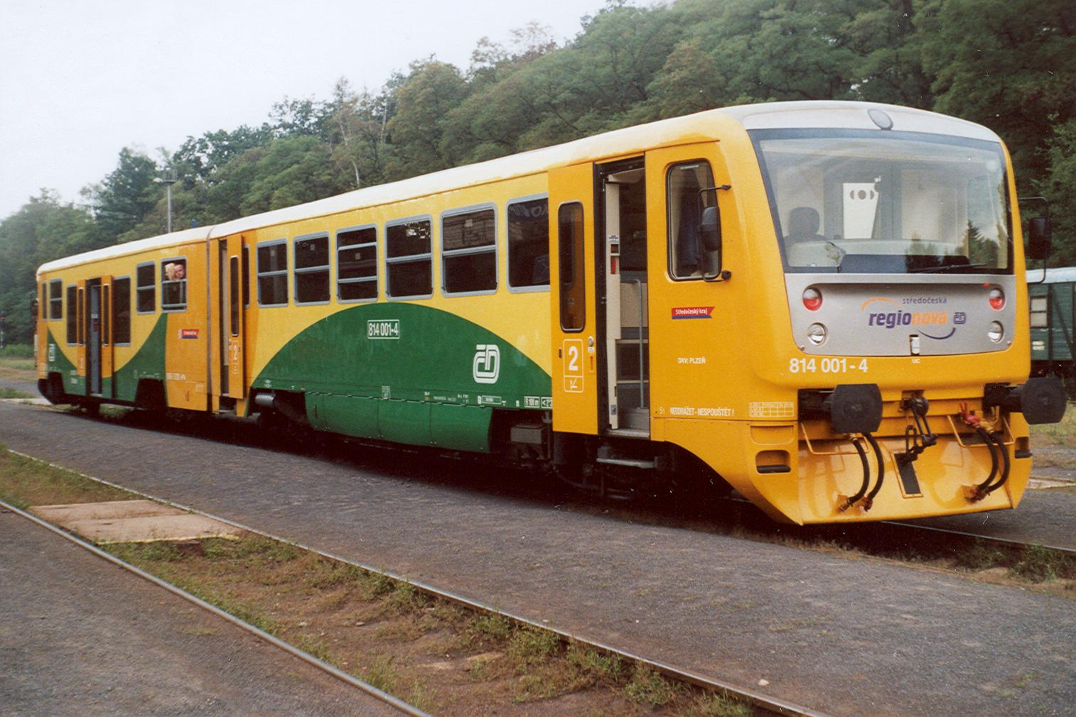 Motorová jednotka 814 ve stanici Lužná u Rakovníka.